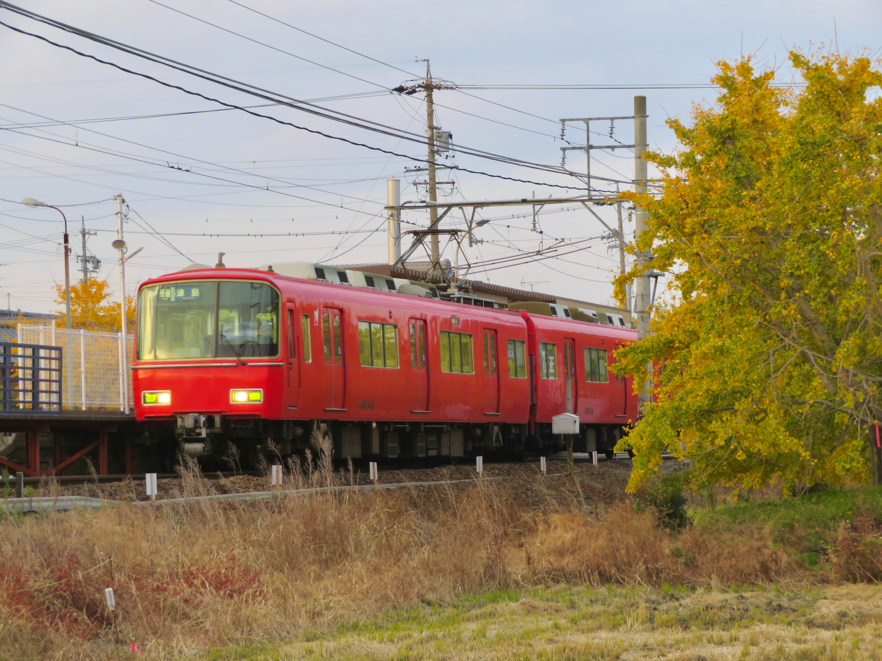 名鉄山崎駅に到着した名鉄電車。